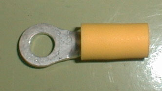 solderless terminal